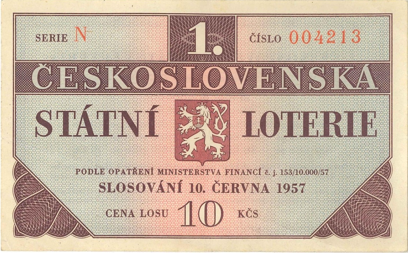 první los státní loterie